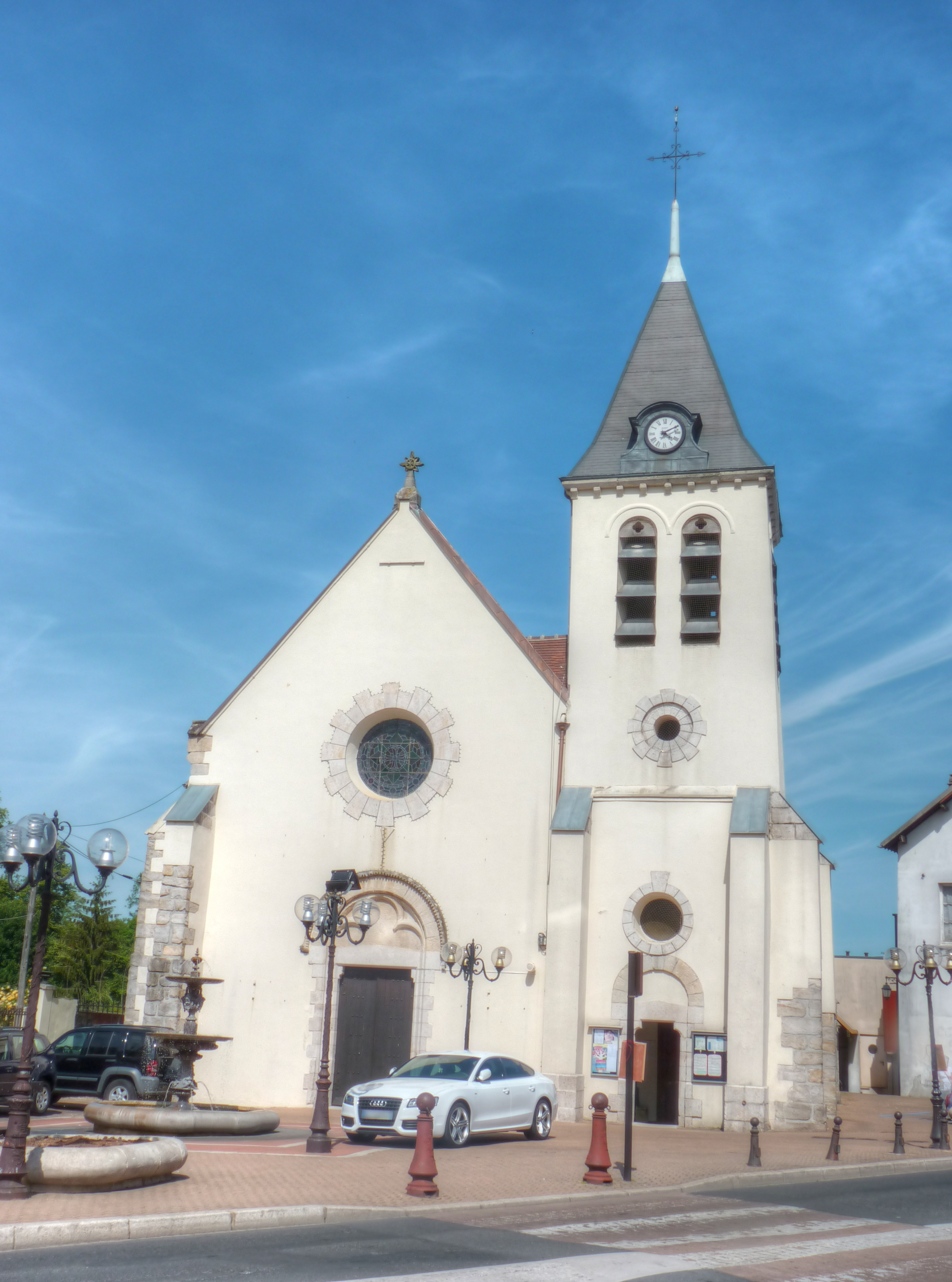 Image HDR de l'Église Catholique Saint Pierre à Ozoir-la-Ferrière.